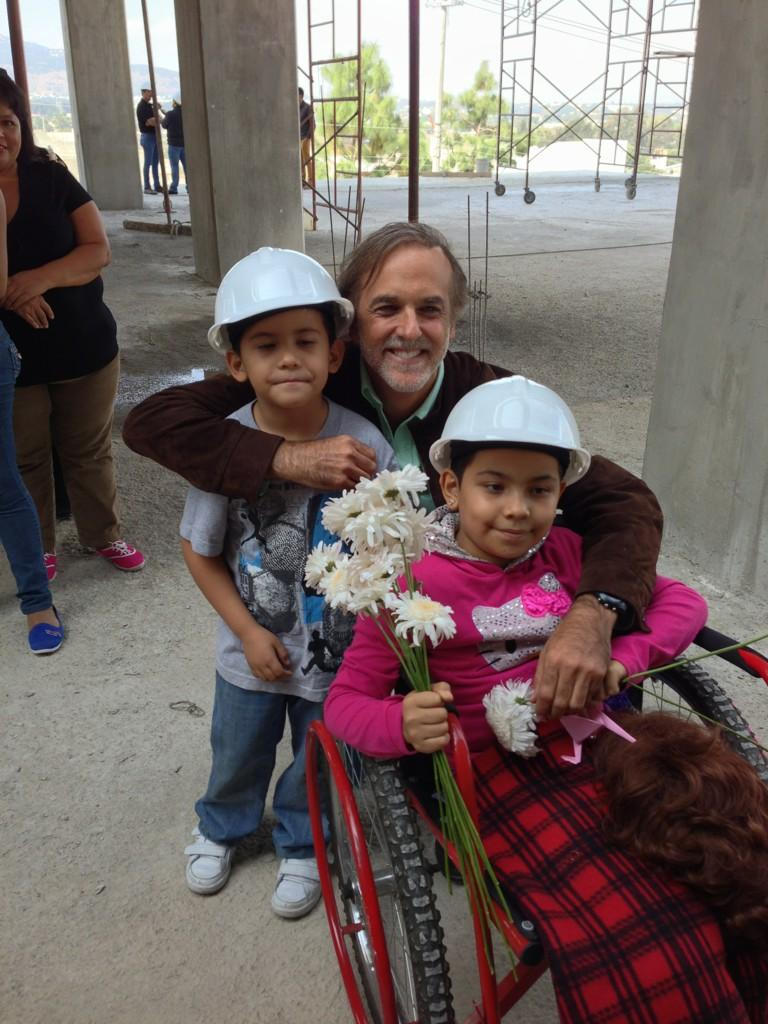 Paco ayuda internacional